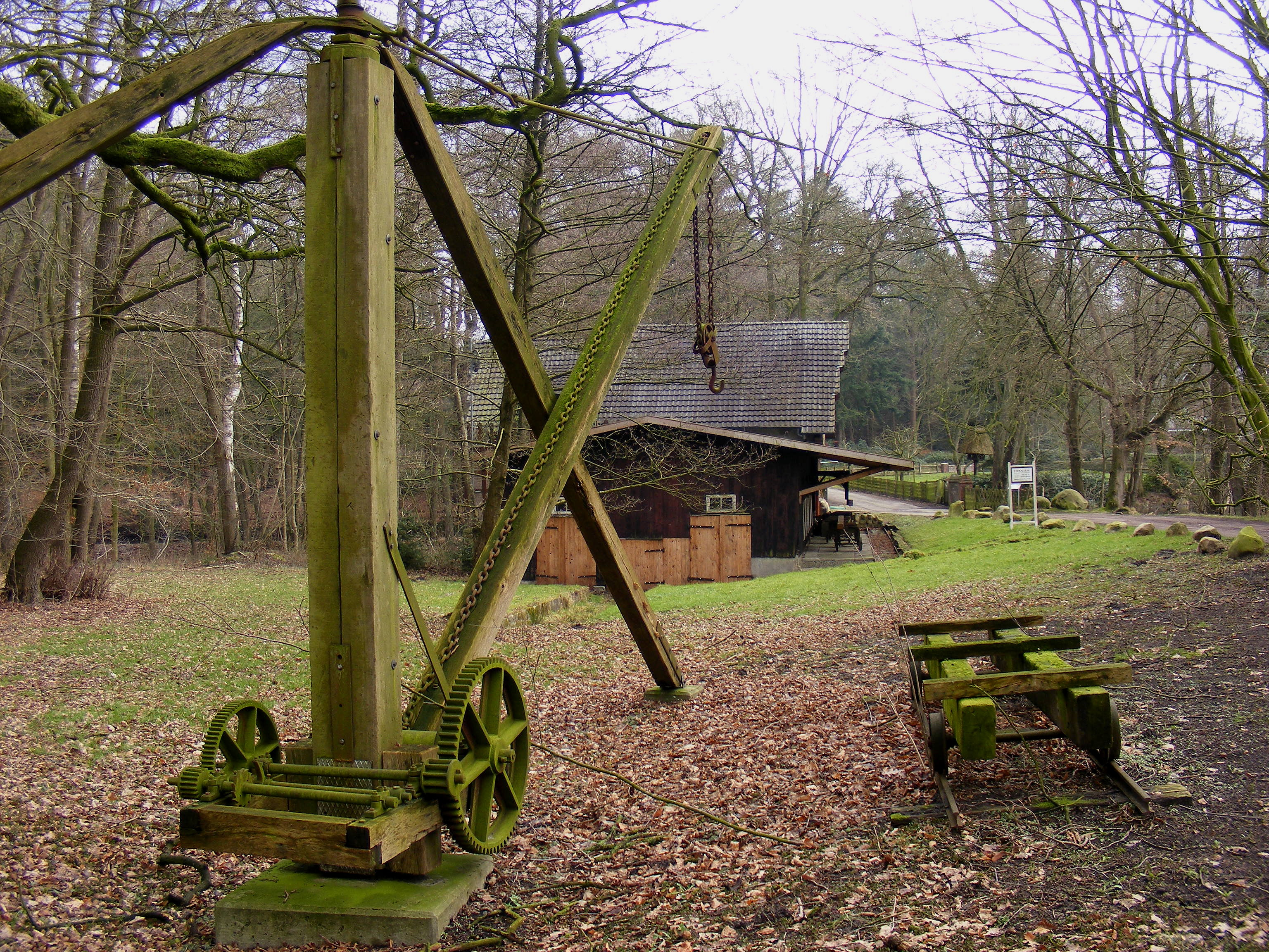 Wassermühle in Visbek